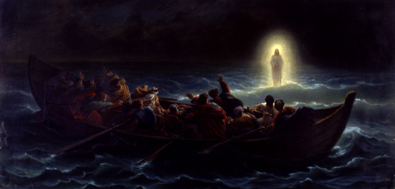 Le Christ marchant sur la mer